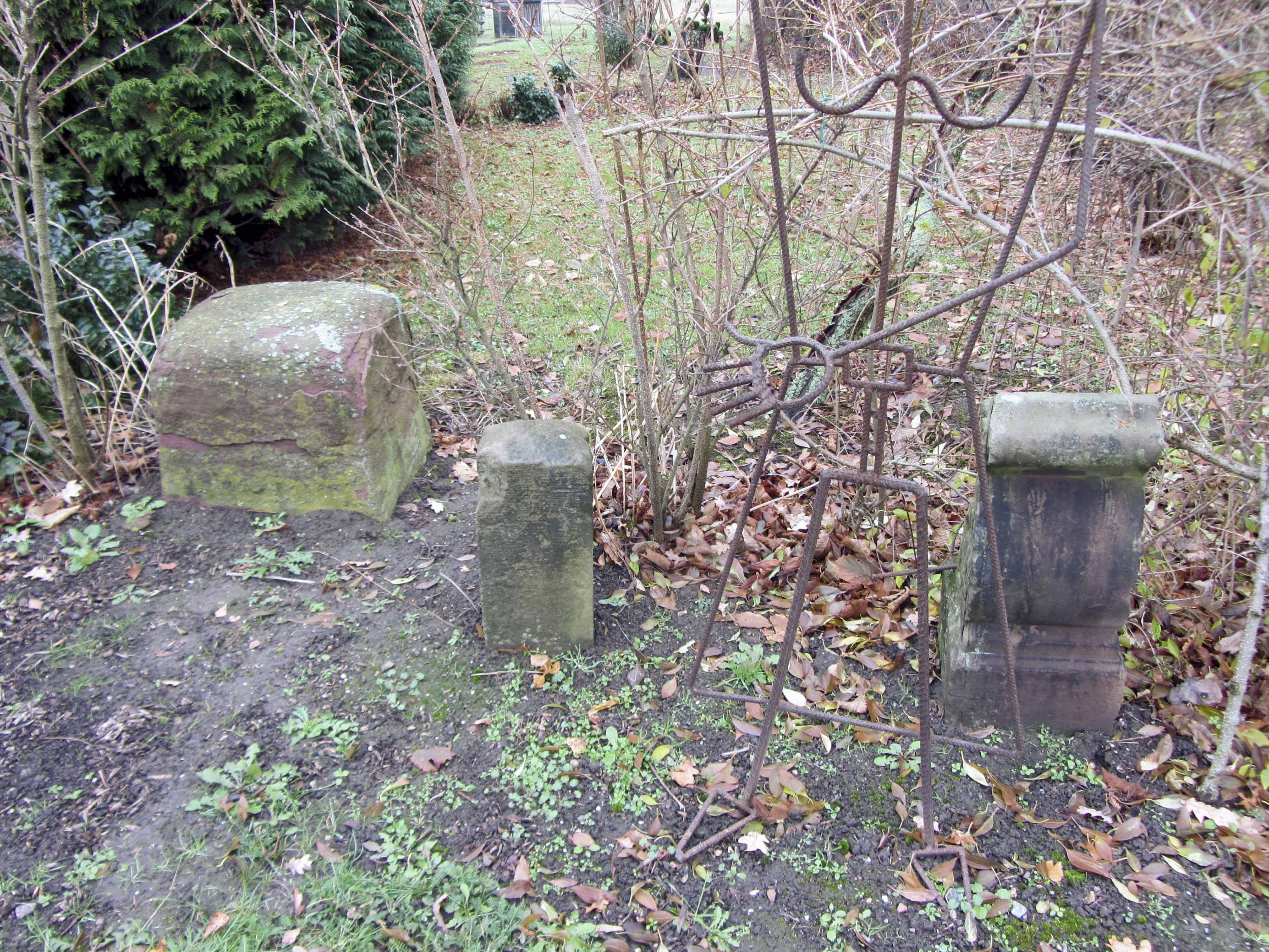 Steinsammlung an der B 6, im Vorgarten von Wohnhaus Nr. 2, in Kabelsketal OT Großkugel